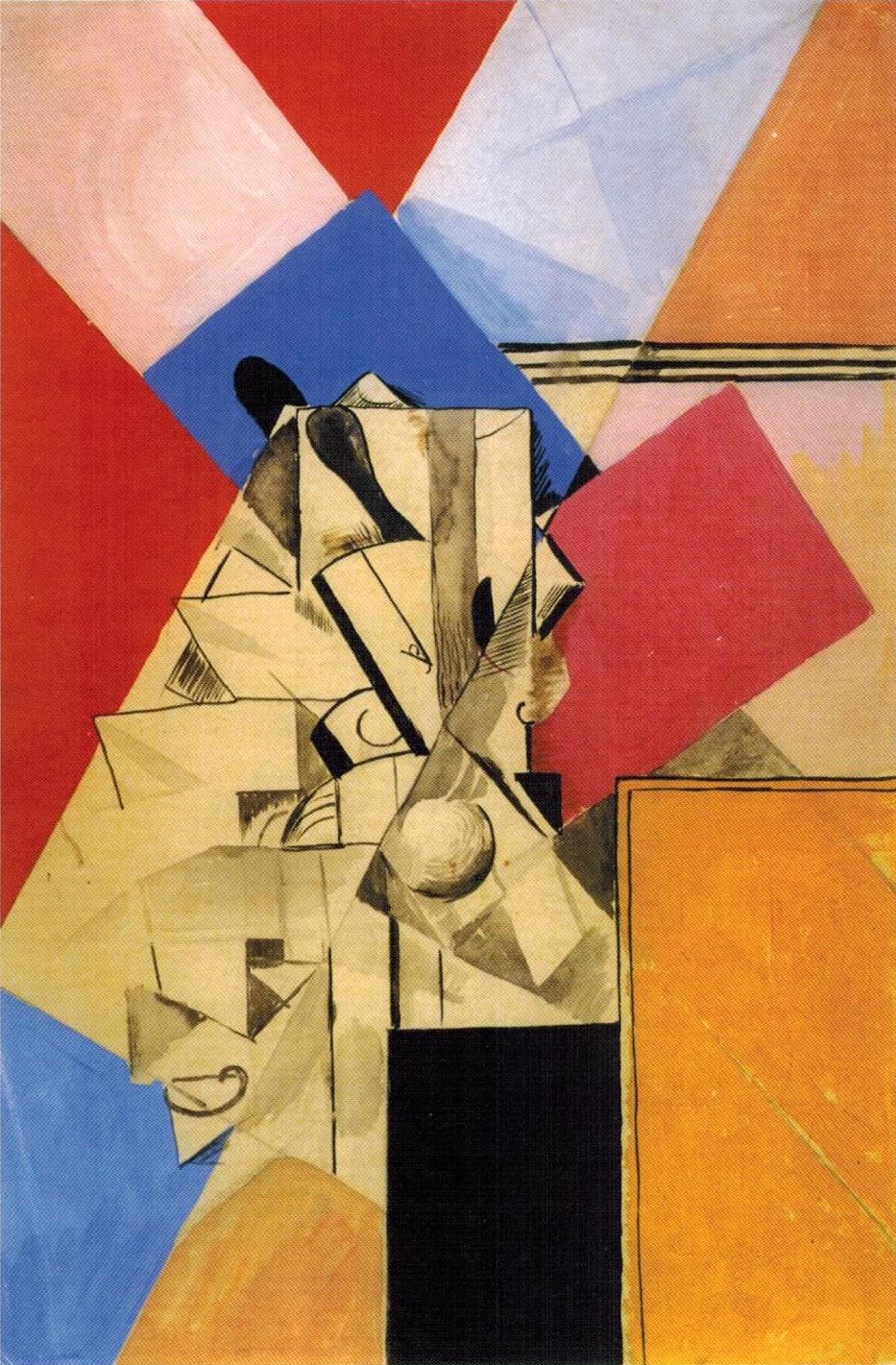 Алексей Моргунов. Композиция. 1915